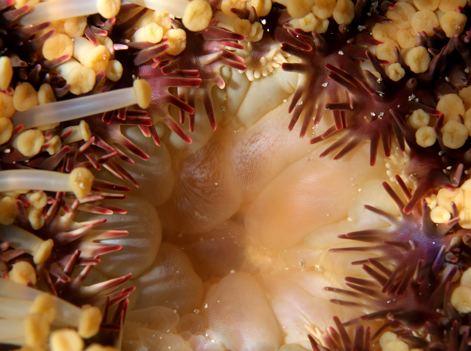 Gros plan sur l'estomac partiellement dévaginé d'une étoile de mer Acanthaster planci (à la Réunion).